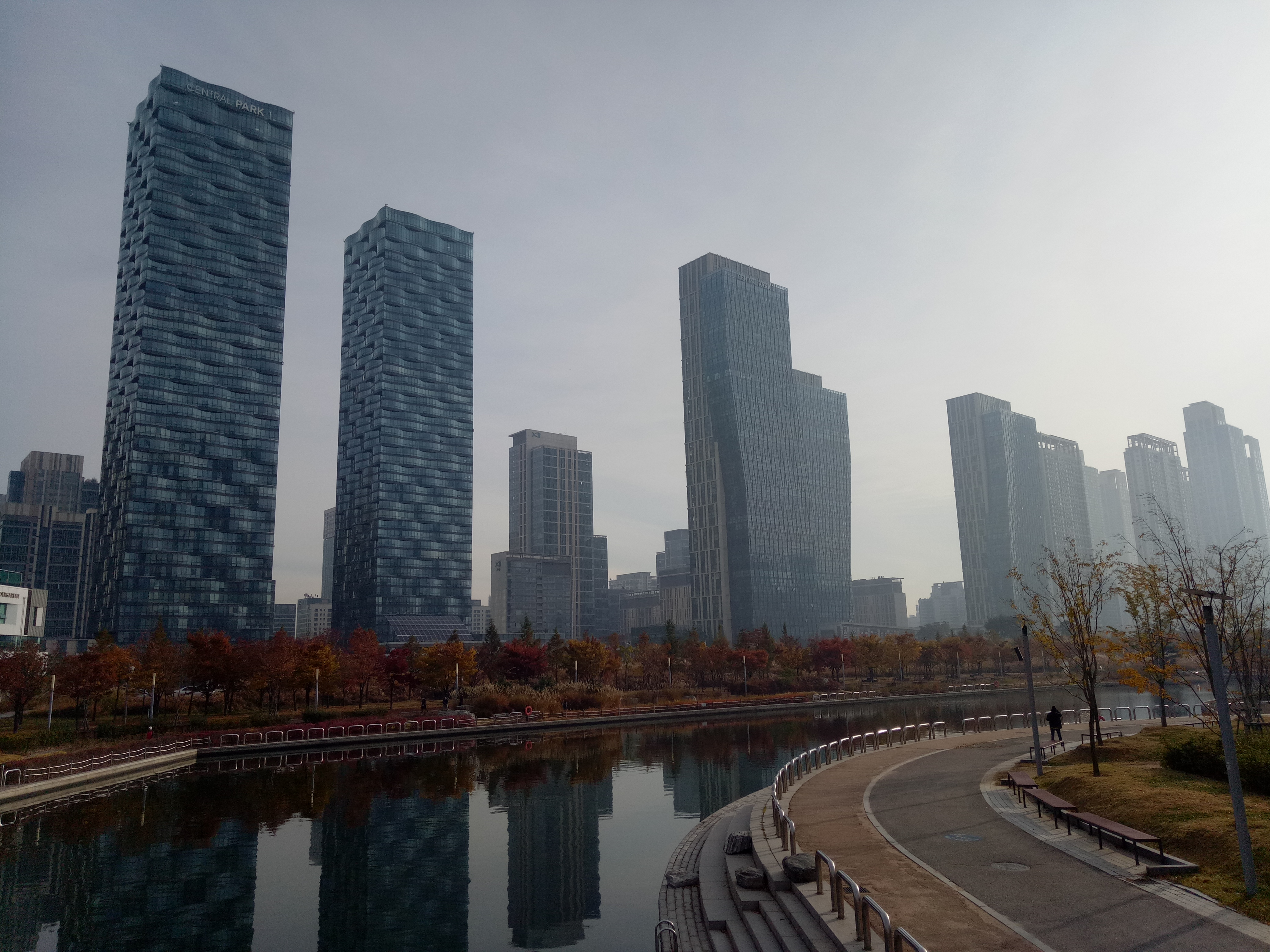 松島中央公園，位於大韓民國仁川廣域市松島國際都市